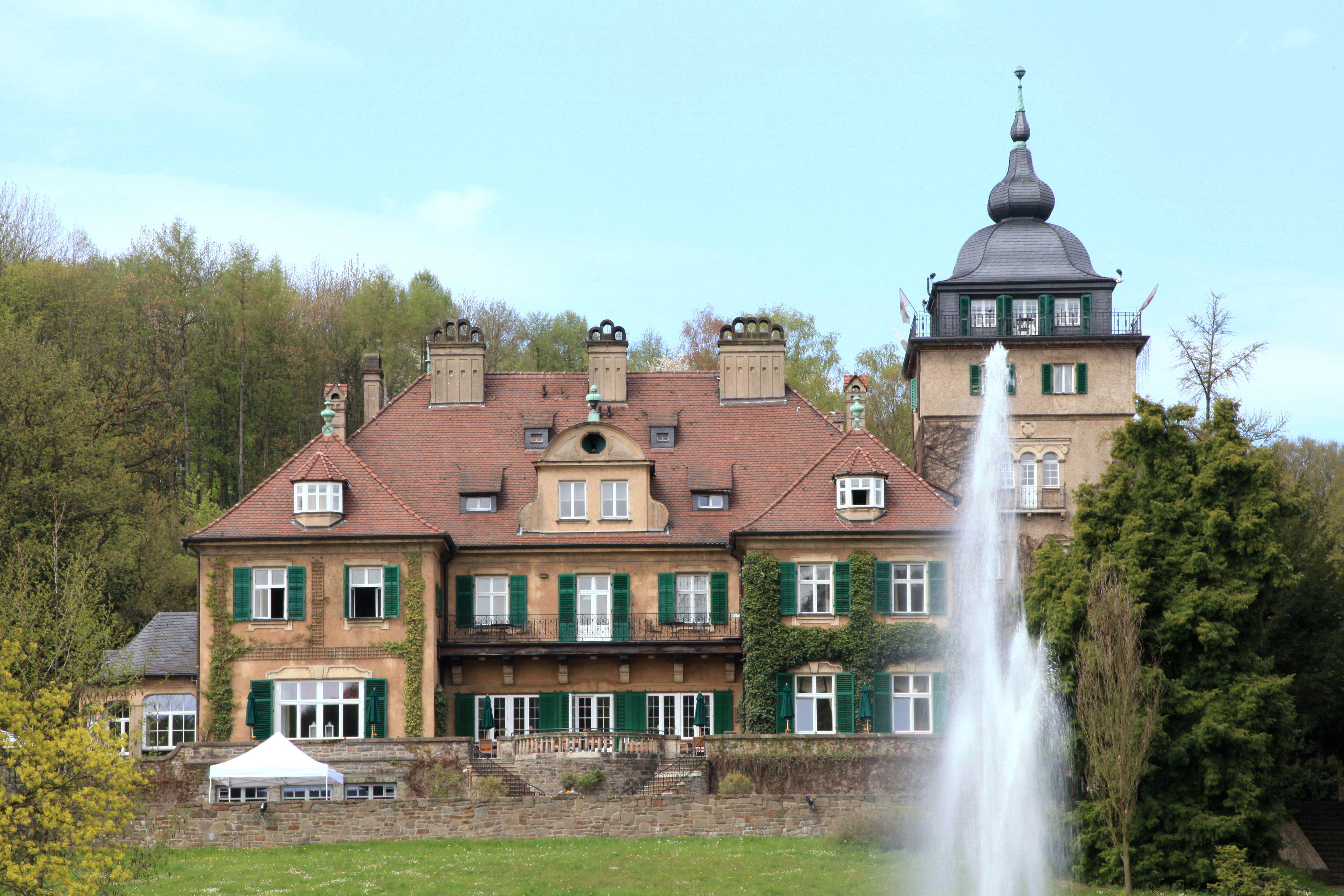 Schloss Lerbach, Lerbacher Weg in Bergisch Gladbach